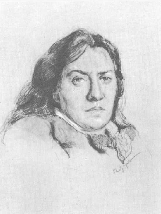 Портрет Валентины Семеновны Серовой. Бумага, графитный карандаш. 32,8 x 23,5. Справа внизу авторская надпись: Питеръ Третьяковская галерея (с 1914).